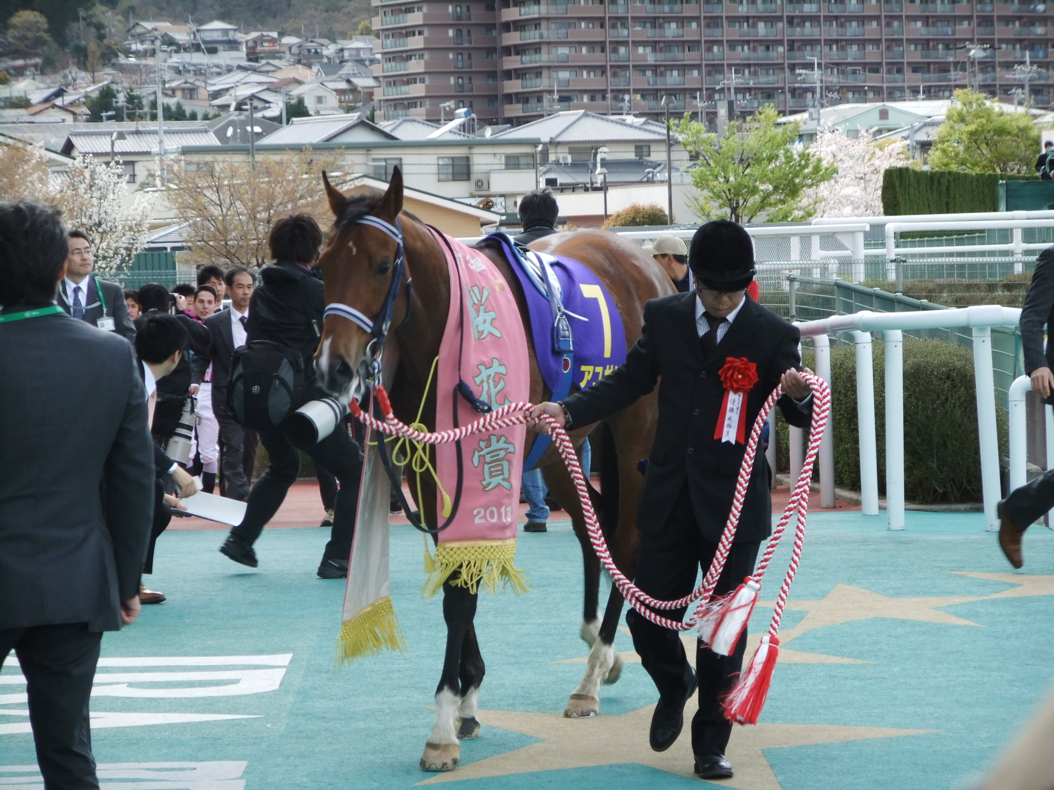 アユサン 2013年4月7日 阪神競馬場